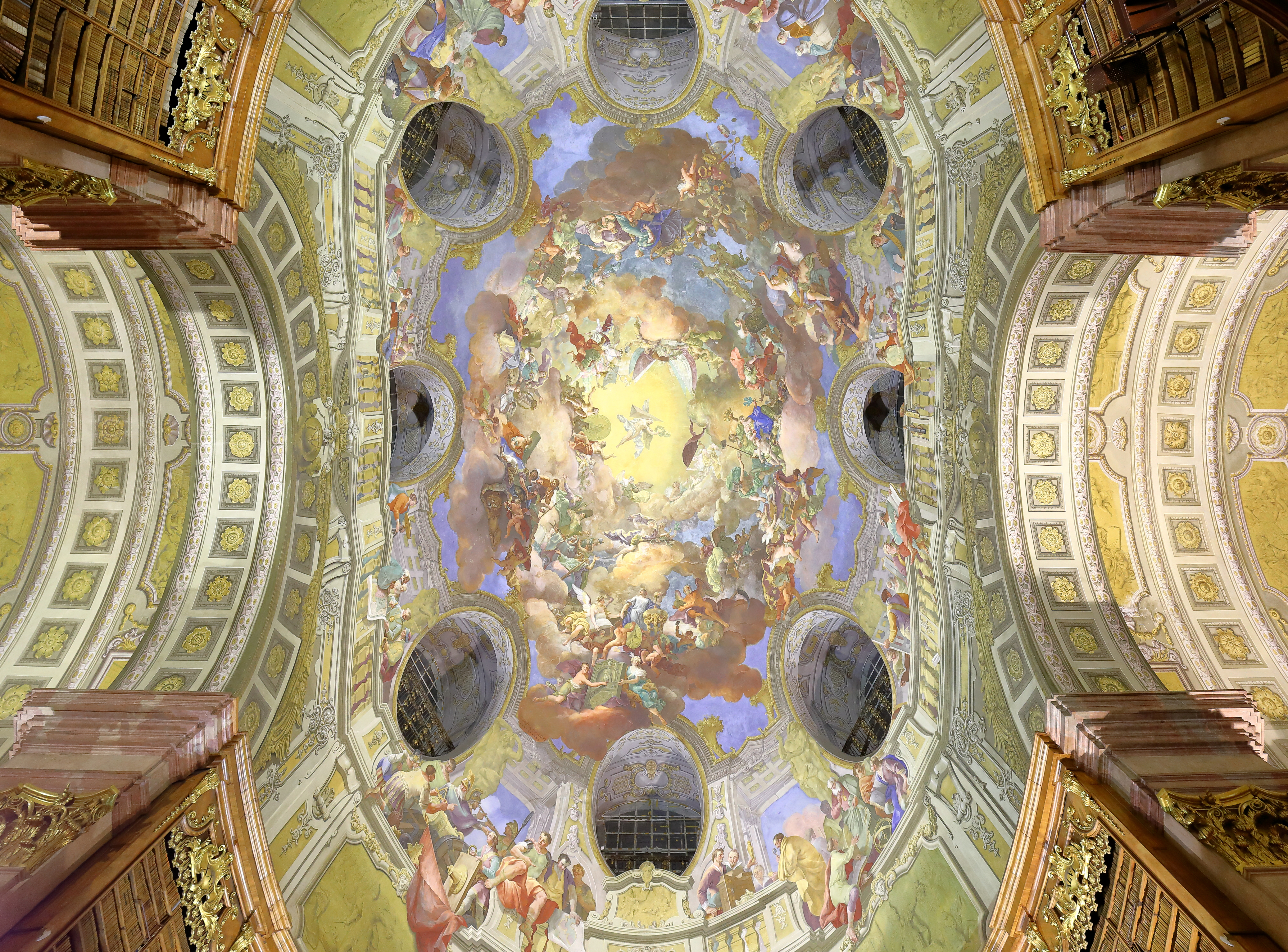 Kuppelfresko des Prunksaales der Österreichischen Nationalbibliothek in der österreichischen Bundeshauptstadt Wien.Die Bibliothek mit dem barocken Prunksaal wurde von 1723 bis 1726 von Joseph Emanuel Fischer von Erlach nach Plänen seines Vaters, dem Hofarchitekten Johann Bernhard Fischer von Erlach errichten. Die Deckenfresken stammen von dem Hofmaler Daniel Gran, der diese bis 1730 fertigstellte. Das Deckenfresko der Kuppel, die einen ovalen Grundriss mit den Maßen 18 m und 29,2 m und eine Höhe von 29,2 m hat, stellt die Apotheose Kaiser Karls VI., dem Bauherrn der Hofbibliothek, mit einer Allegorie auf die Erbauung der Bibliothek dar.